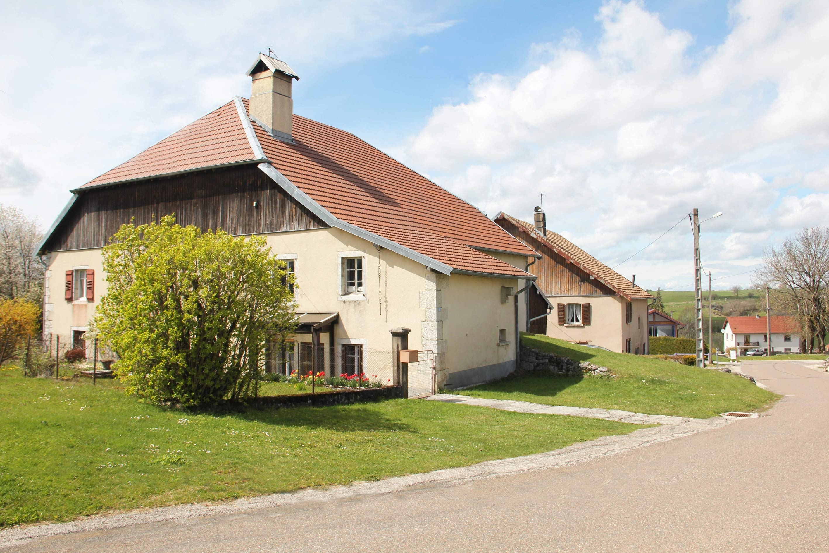 Vue du village de Rantechaux (département du Doubs) - ancienne ferme comtoise